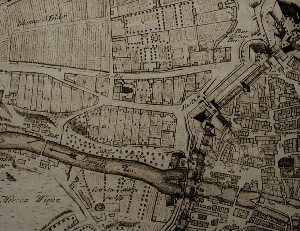 Homann-Plan der Stadt Nürnberg (1773)